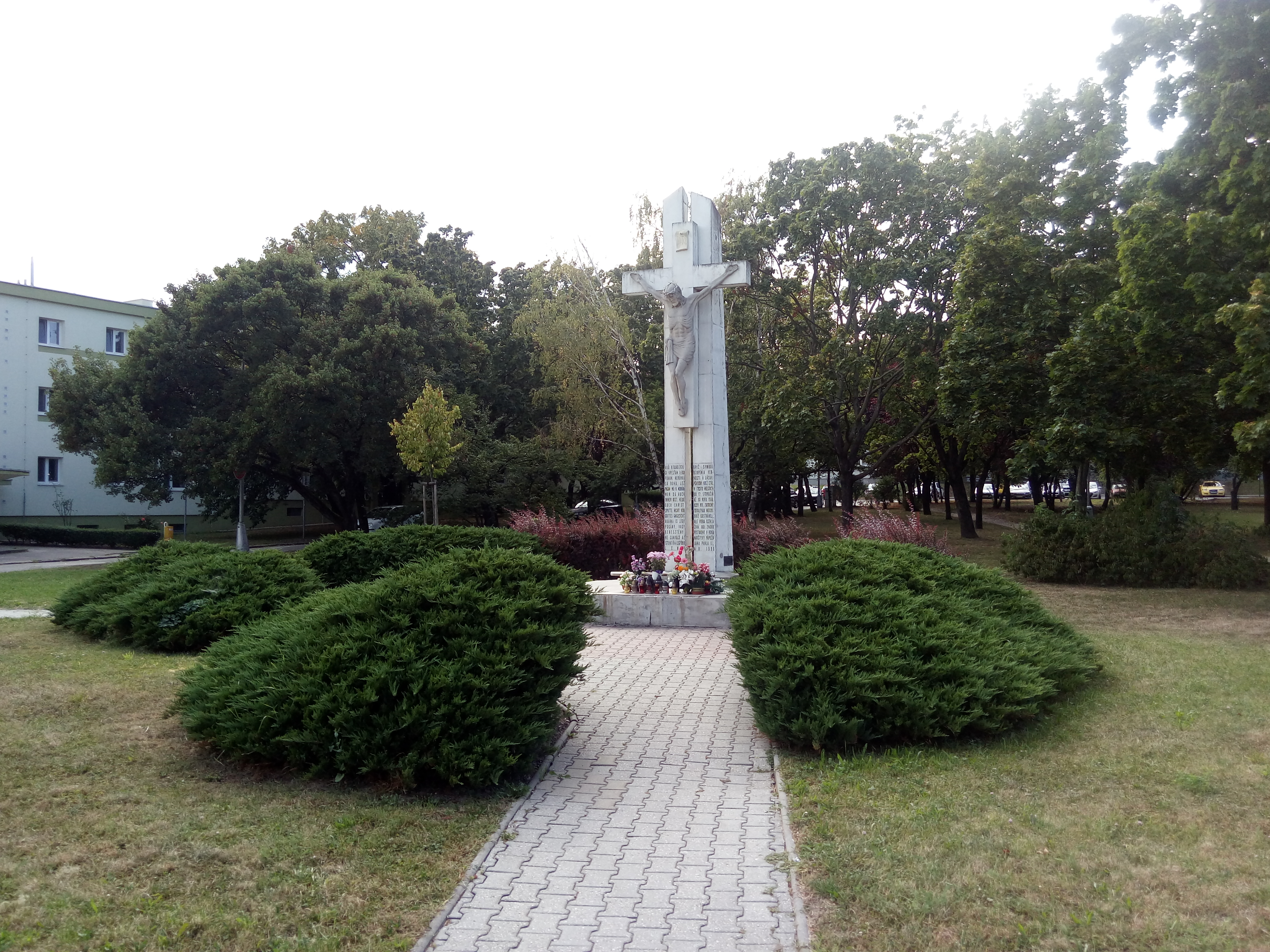 Námestie Biely kríž, Nové Mesto, Bratislava